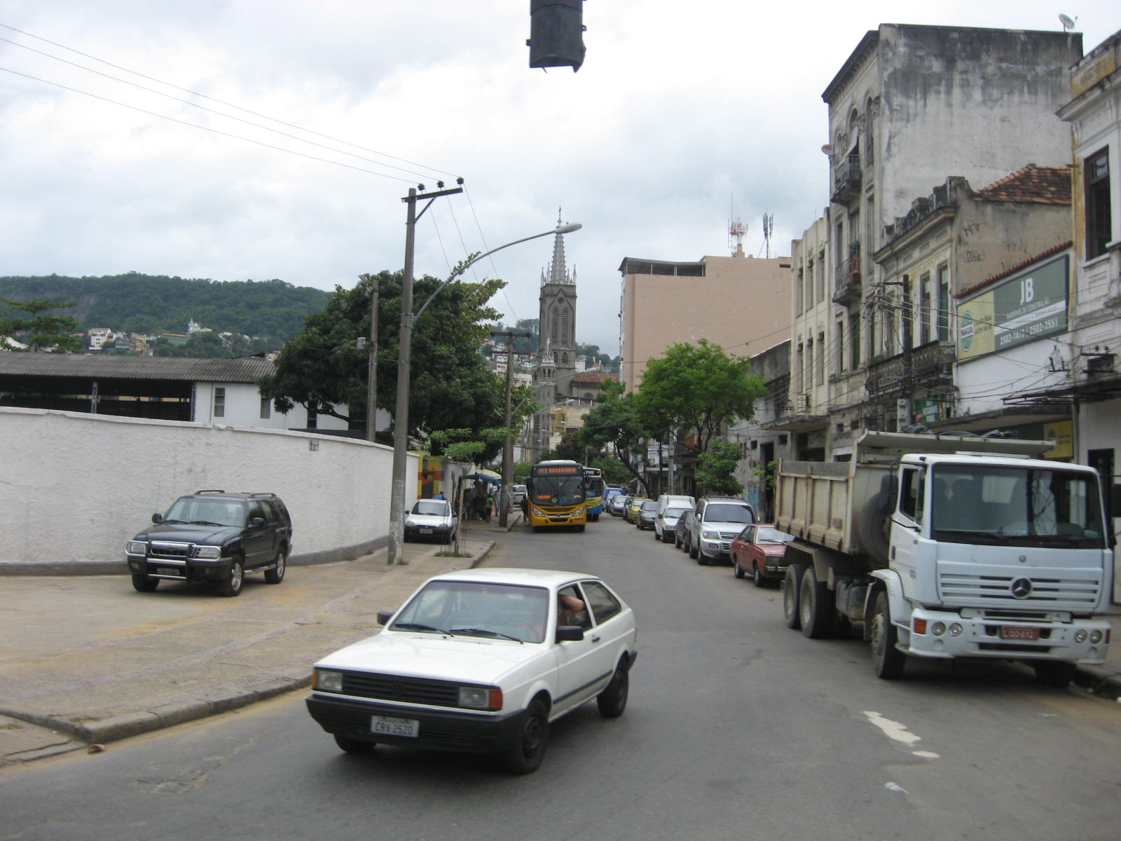 Vista do bairro carioca do Catumbi.